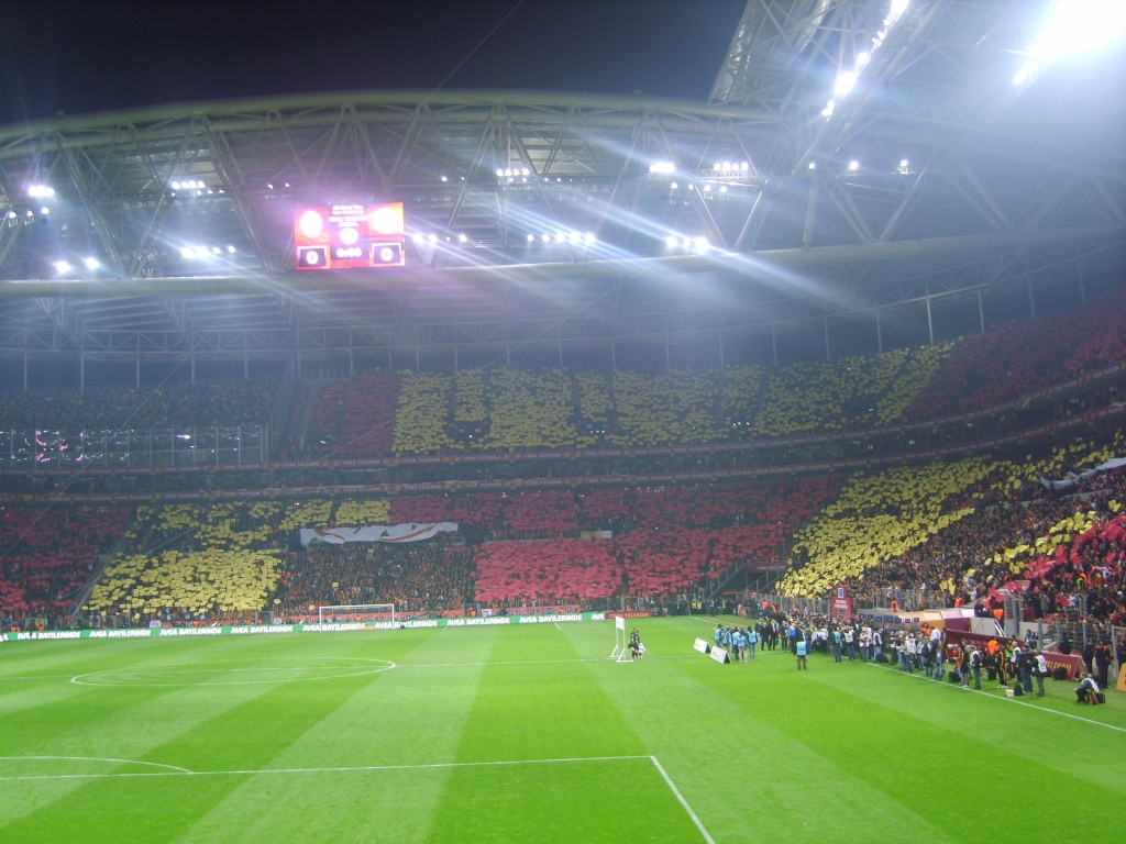 Türk Telekom Arena